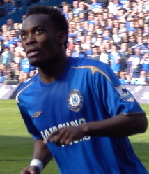 Hình Michael Essien trong màu áo Chelsea ??u n?m vi:2006.